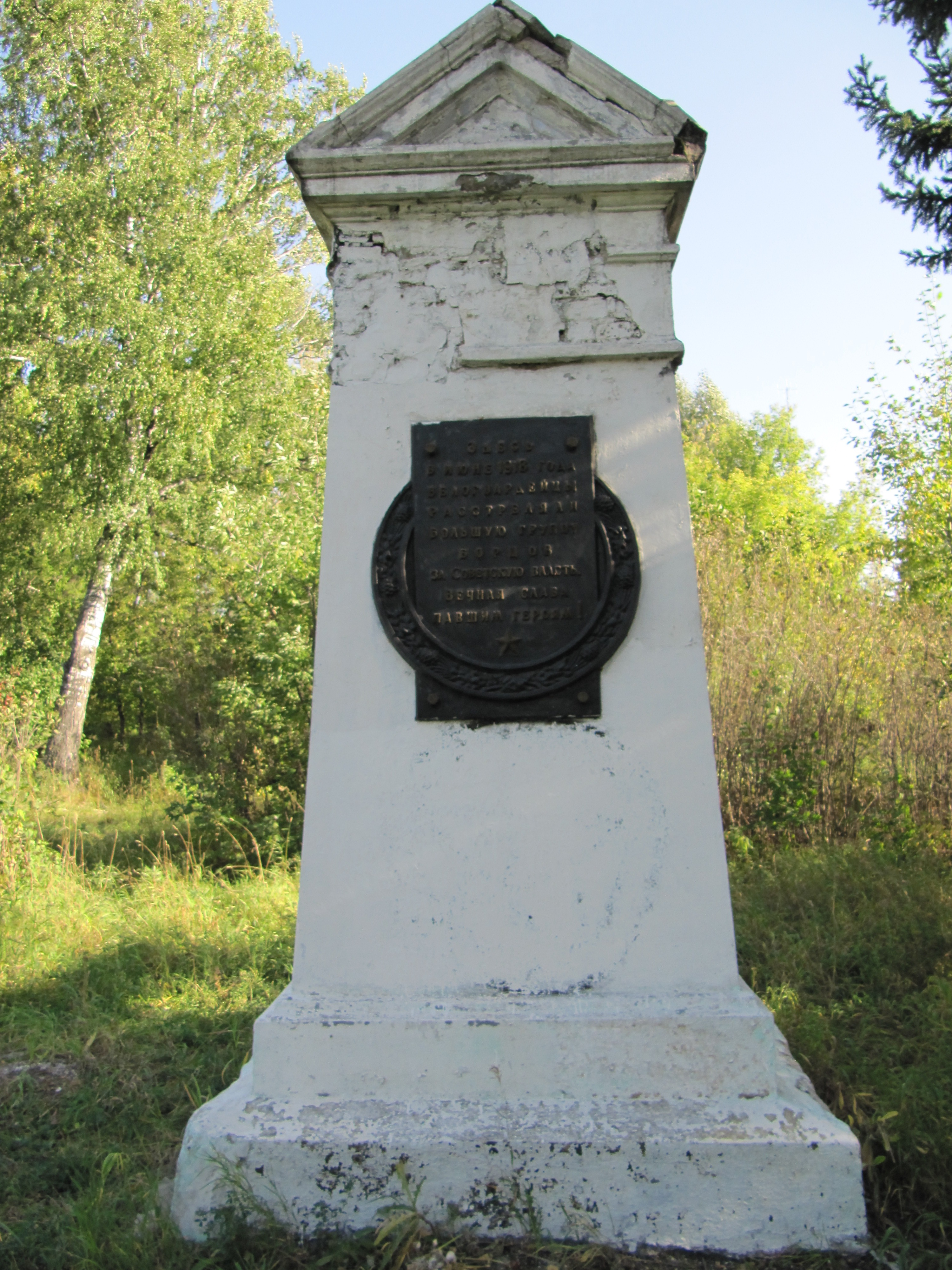 Памятник жертвам белого террора в Барнауле - июнь 1918 г.